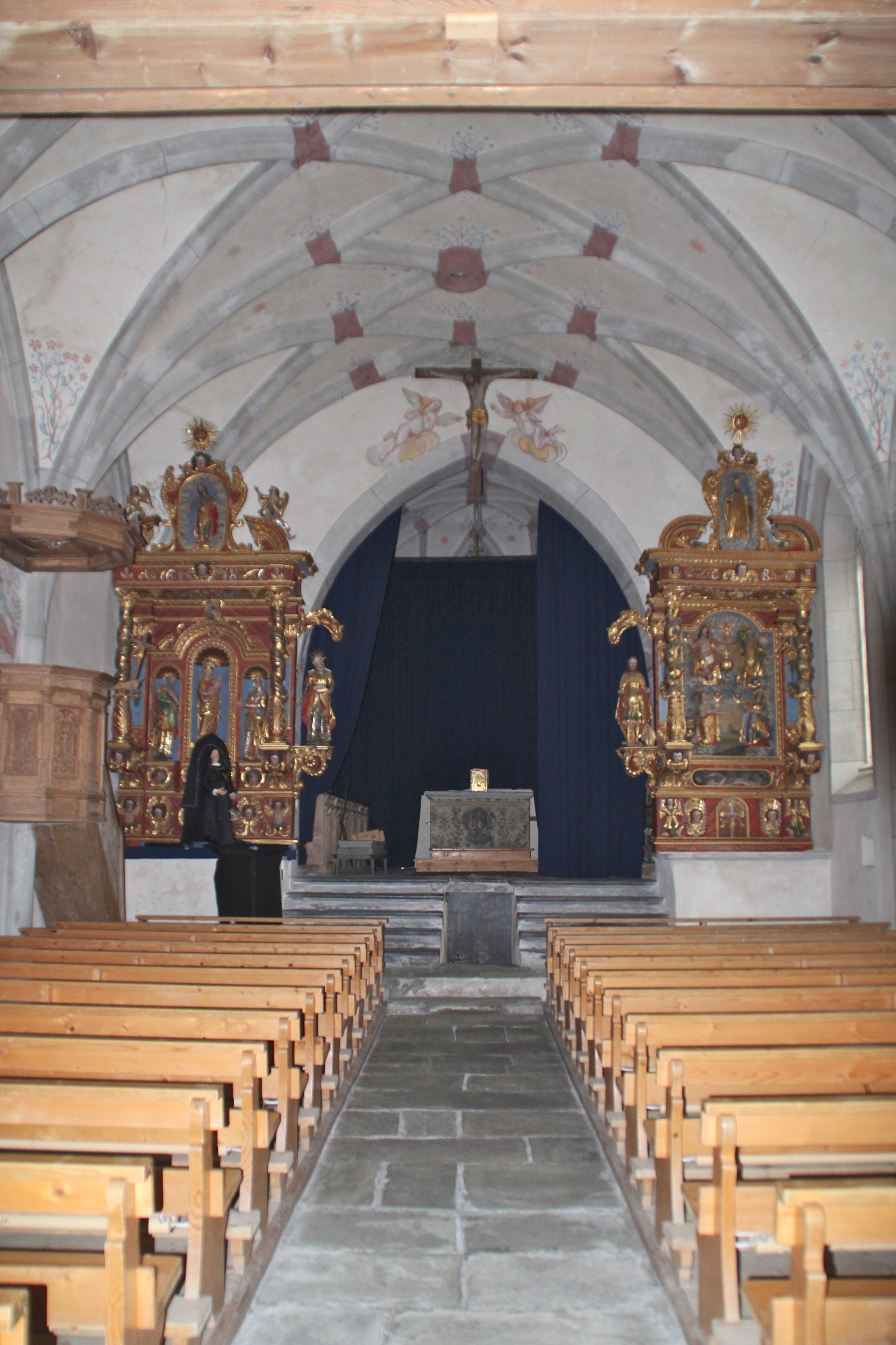 Kirche Sogn Gion Inneres; Altar abgedeckt